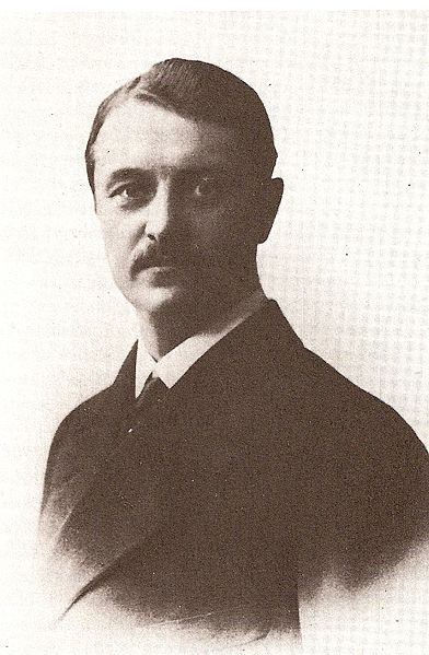 Swedish physician Ivar Wickman (1872-1914)